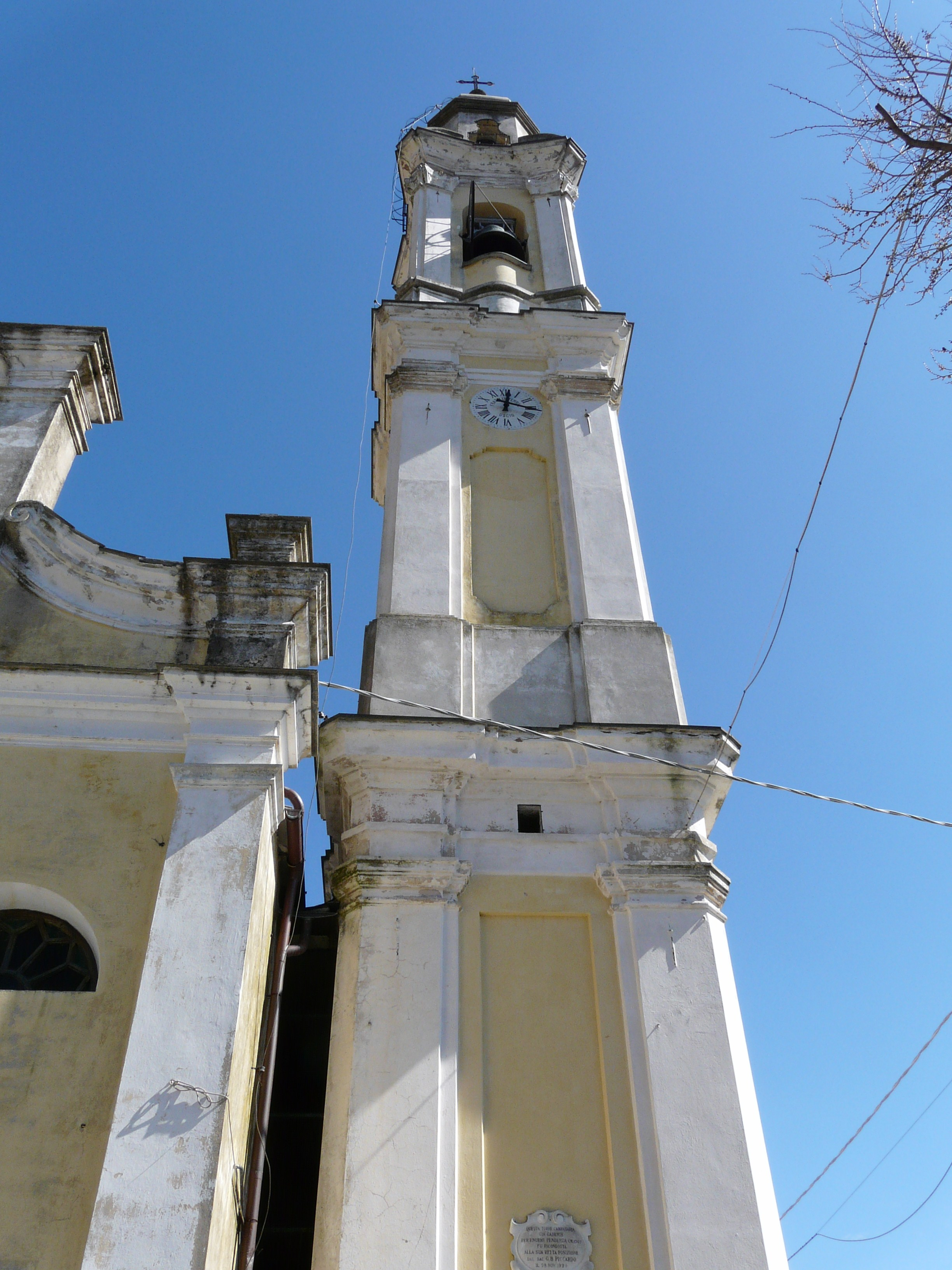 Chiesa di San Colombano, Moranego, Davagna, Liguria, Italia